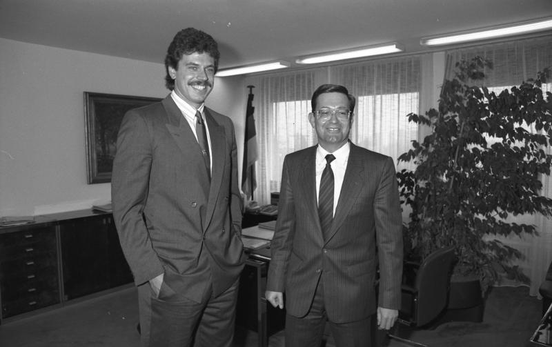 22.10.1987 Parlamentarischer Staatssekretär Carl-Dieter Spranger empfängt den Zehnkämpfer Jürgen Hingsen im Bundesministerium des Innern